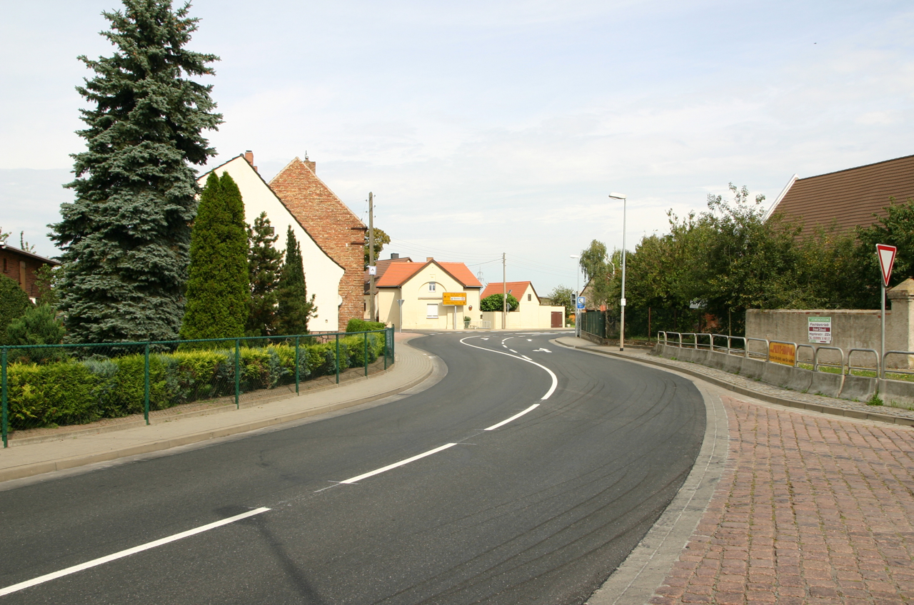 Porst ist ein Stadtteil von Köthen (Anhalt), Sachsen-Anhalt.